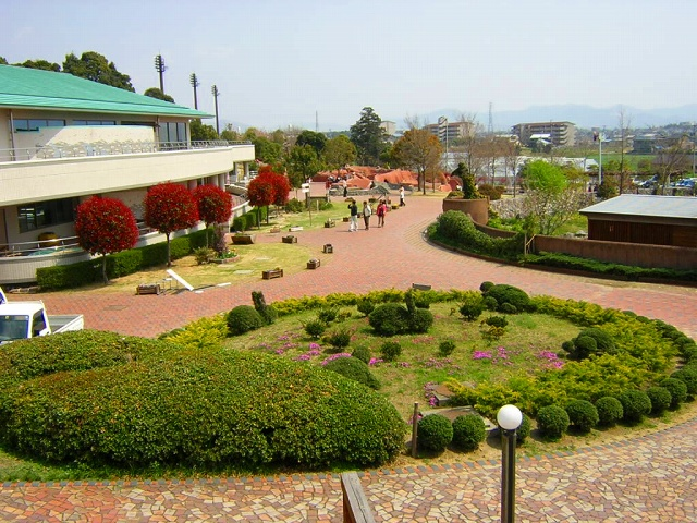 山麓の赤塚山公園